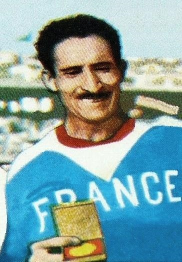 1972 : 'PANINI OLYMPIA 1896 - 1972 OLYMPIC GAMES' - 1956 (n°180)